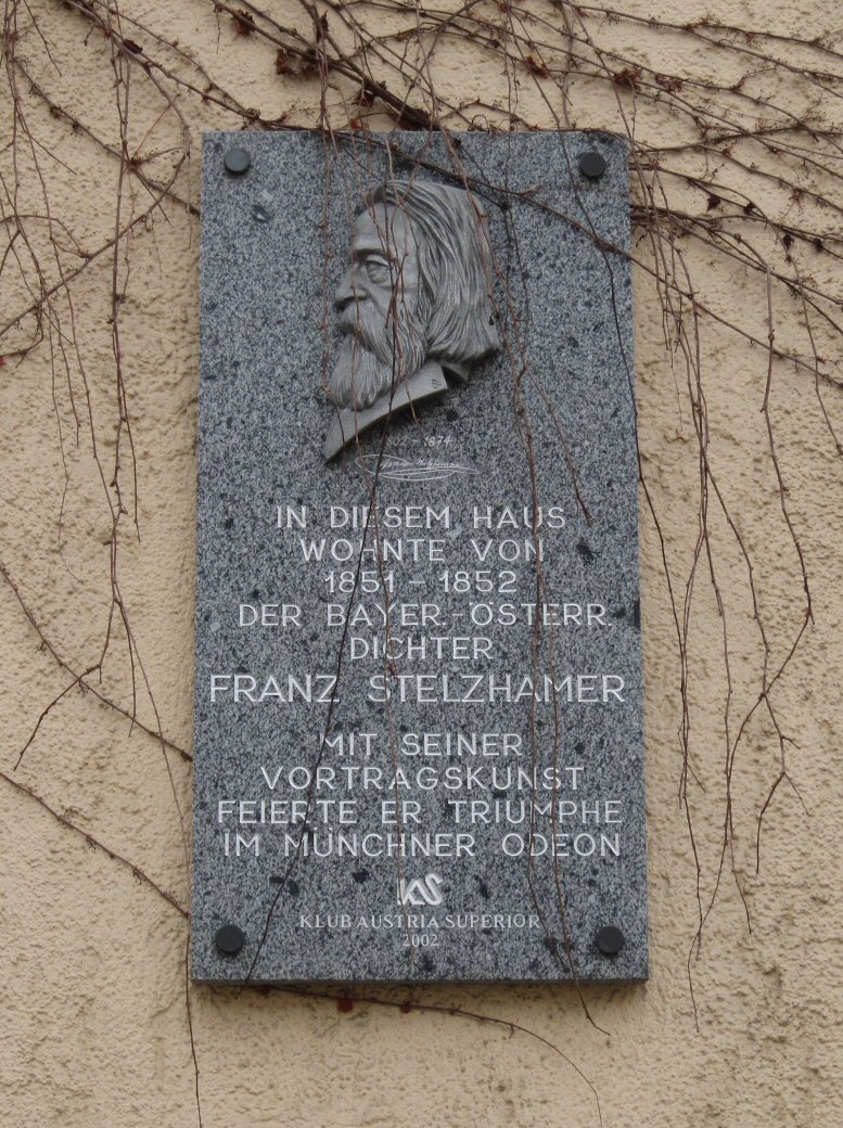 München, Müllerstr. 11: Gedenktafel für Franz Stelzhamer